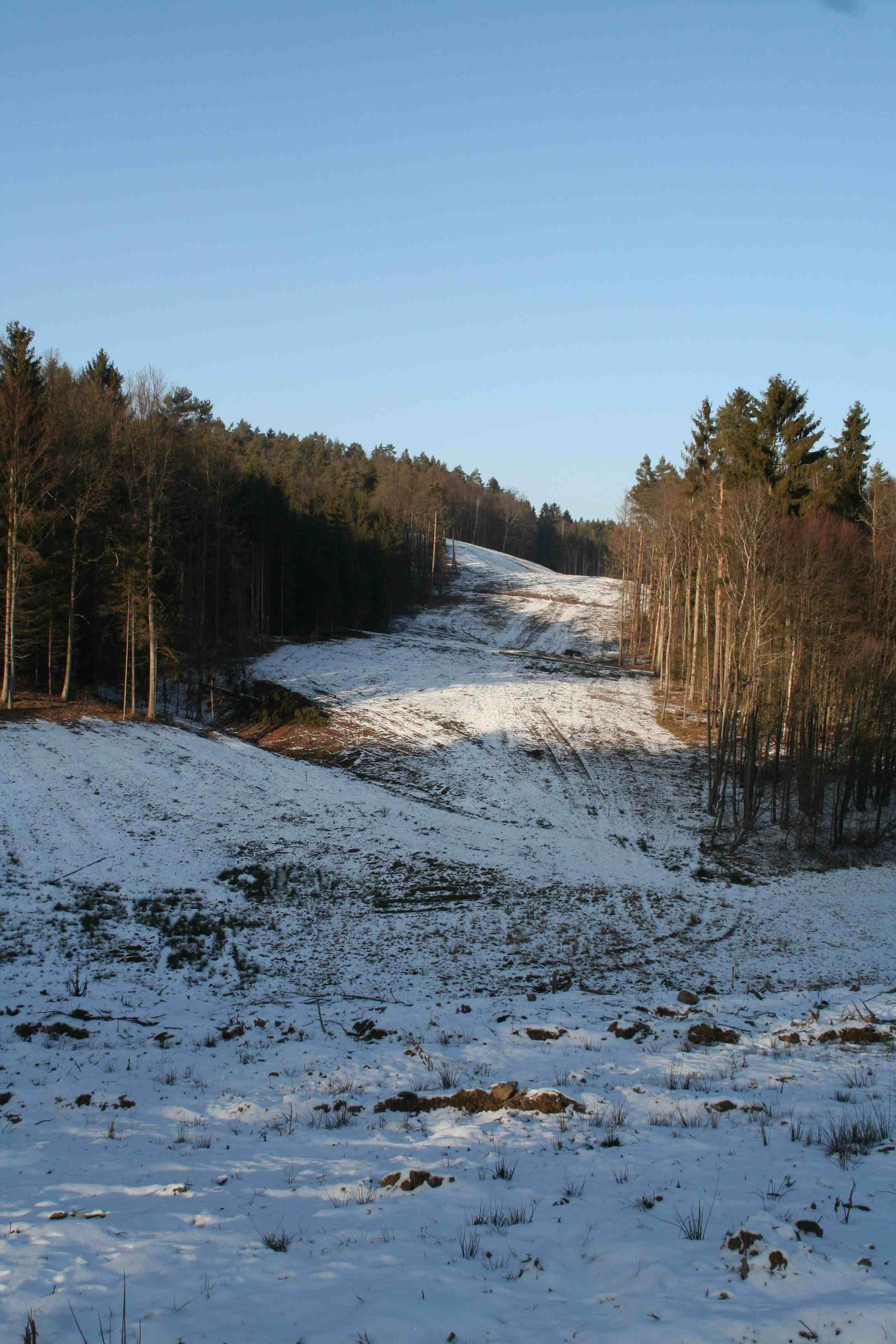 Talbrücke Nestelgraben, Bundesautobahn A73 bei Lichtenfels